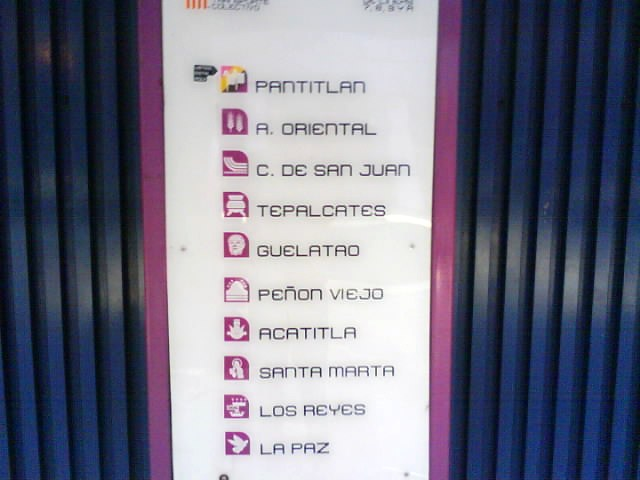 Plano de la linea A metro Pantitlan